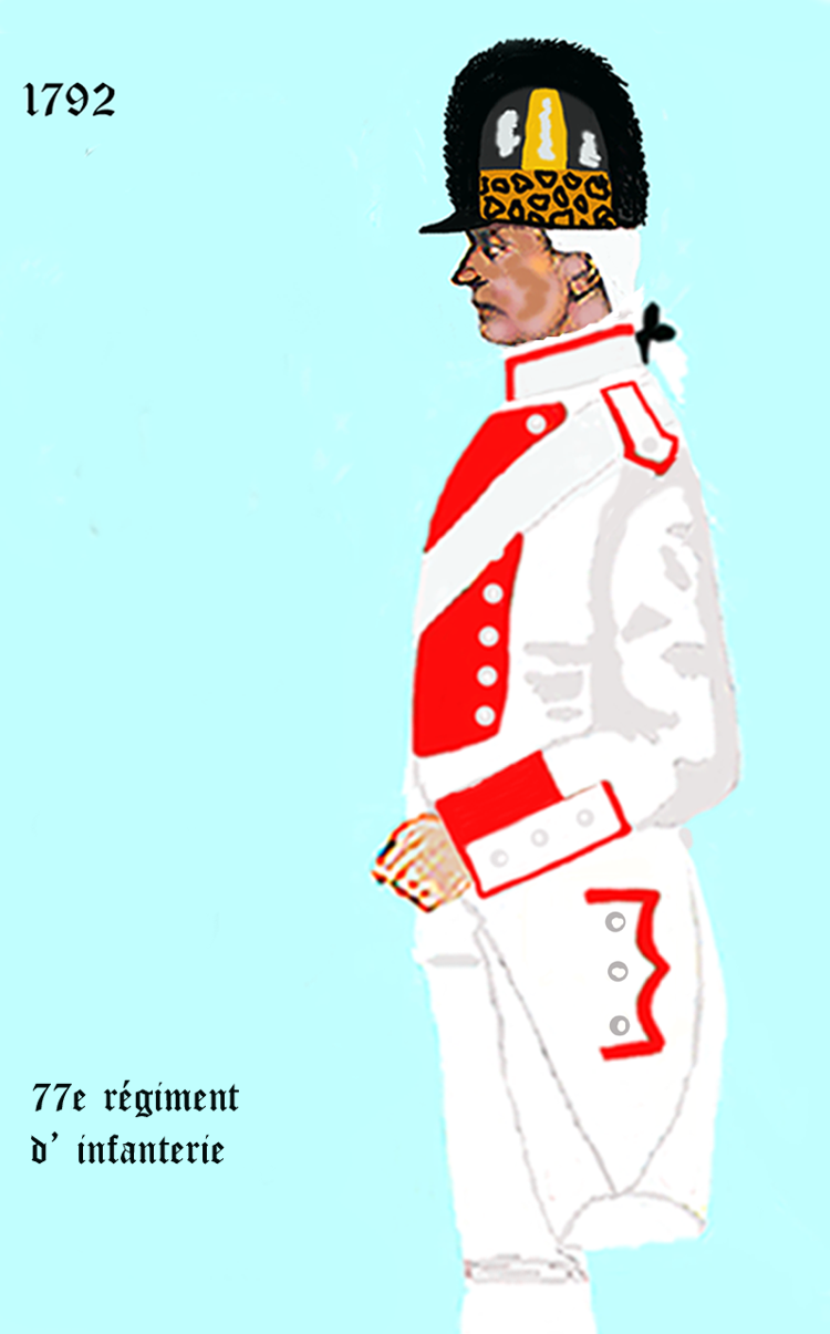 Uniform eines königlich französischen Infanterie-Regiments gemäß Dekret von 1792. - Entnommen und überarbeitet aus: „LES UNIFORMES ET LES DRAPEAUX DE L'ARMÉE DU ROI“ Marseille 1899.